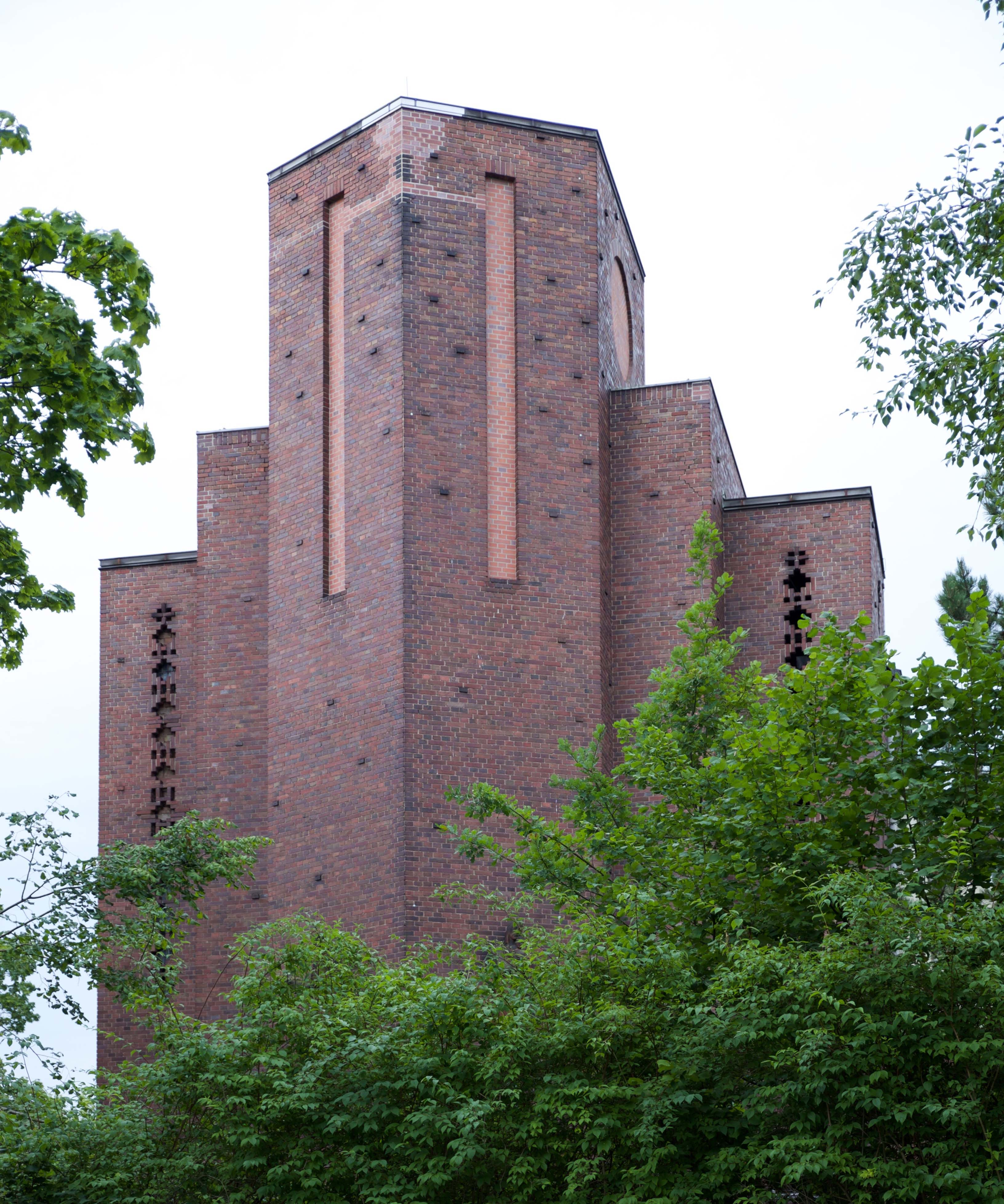 St. Agnes Kapelle im Haus Conradshöhe